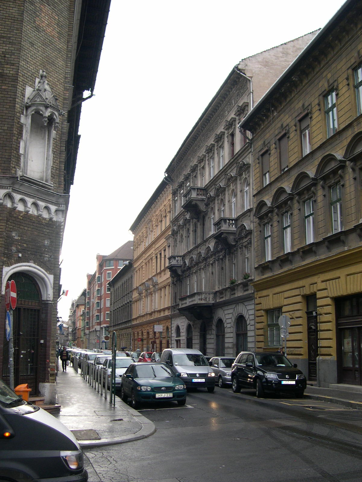 Dob utca (Budapest VII.)